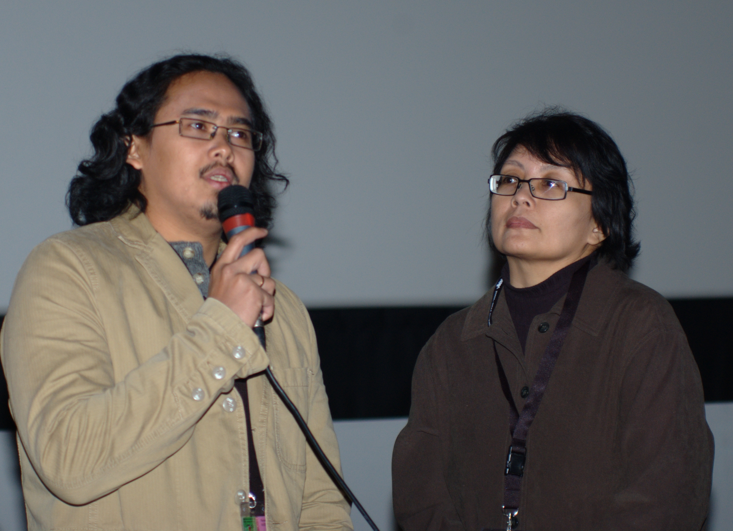 Nurman Hakim (réalisateur indonésien) et Nan Triveni Achnas (réalisatrice et productrice) pendant le festival international des cinémas d'Asie à Vesoul (2009).